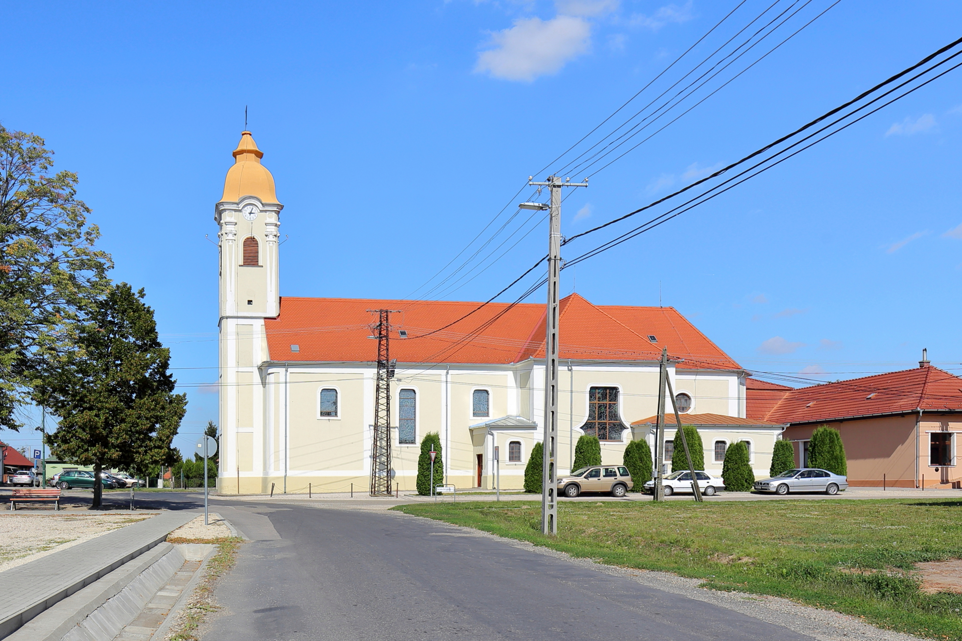 Südwestansicht der Pfarrkirche von Bősárkány.